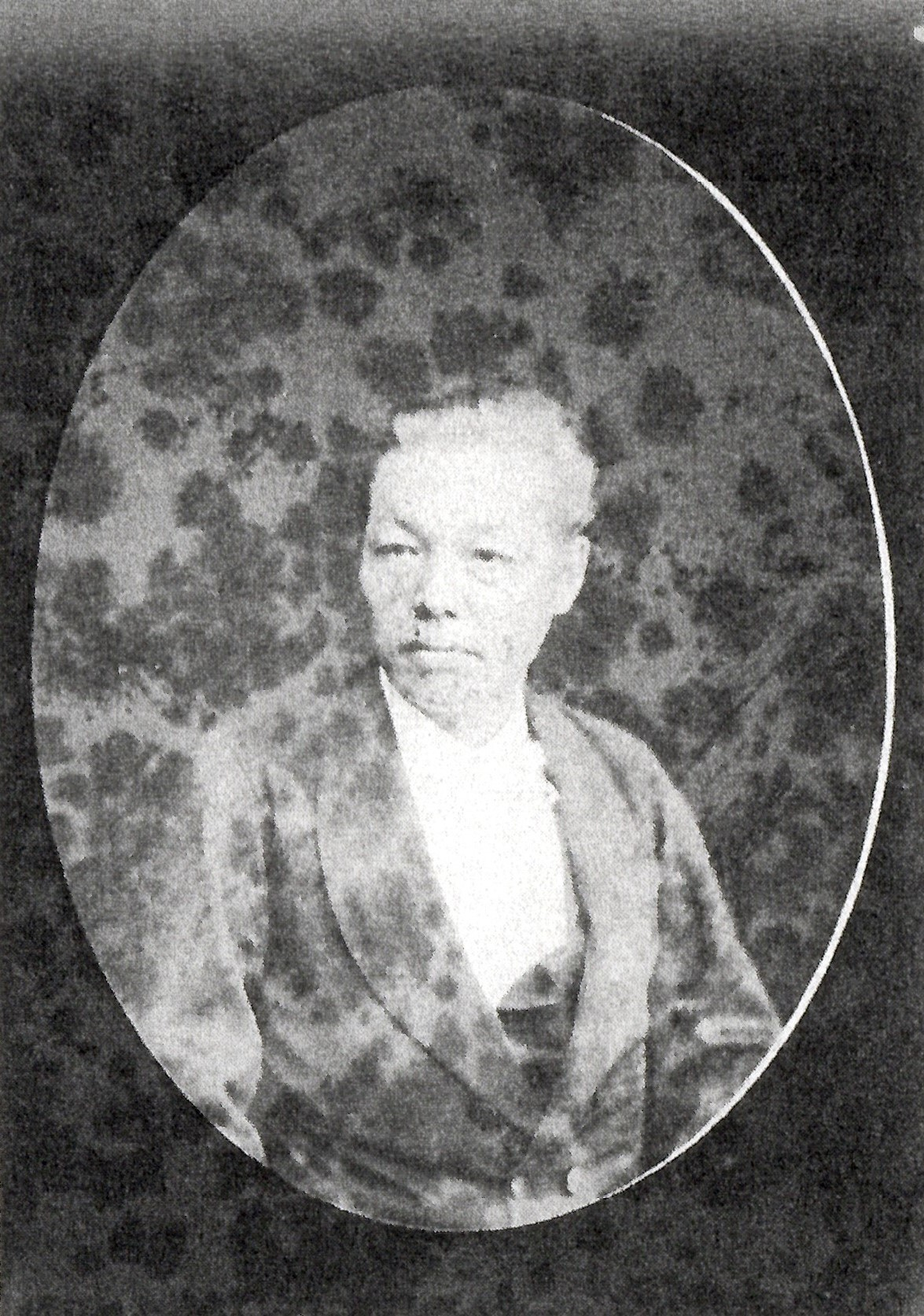 北小路俊昌の肖像写真。